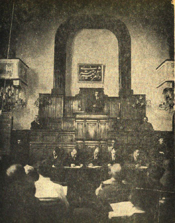 TBMM duvarında "Ve emruhum şûrâ beynehum" ayetinin olduğu ilk toplantı fotoğrafıdır.